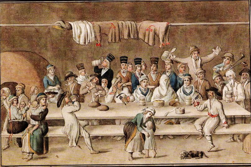 Bm03010am. [Die liefländische Bauerhochzeit; Ehstland; die Ansicht; die Tracht].